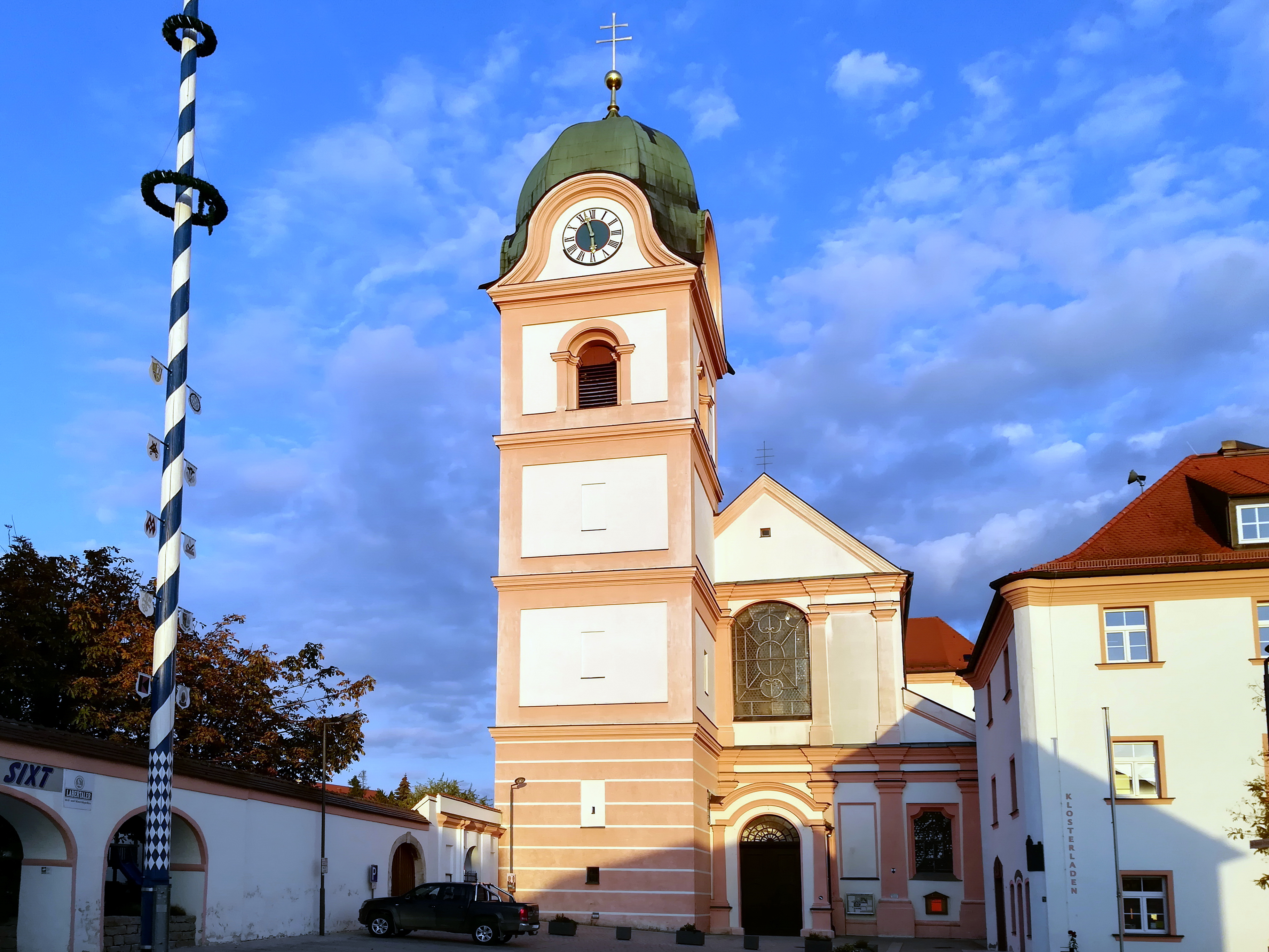 Das Kloster Rohr ist ein ehemaliges Kloster der Augustiner-Chorherren und heute eine Benediktinerabtei in Rohr in Niederbayern.